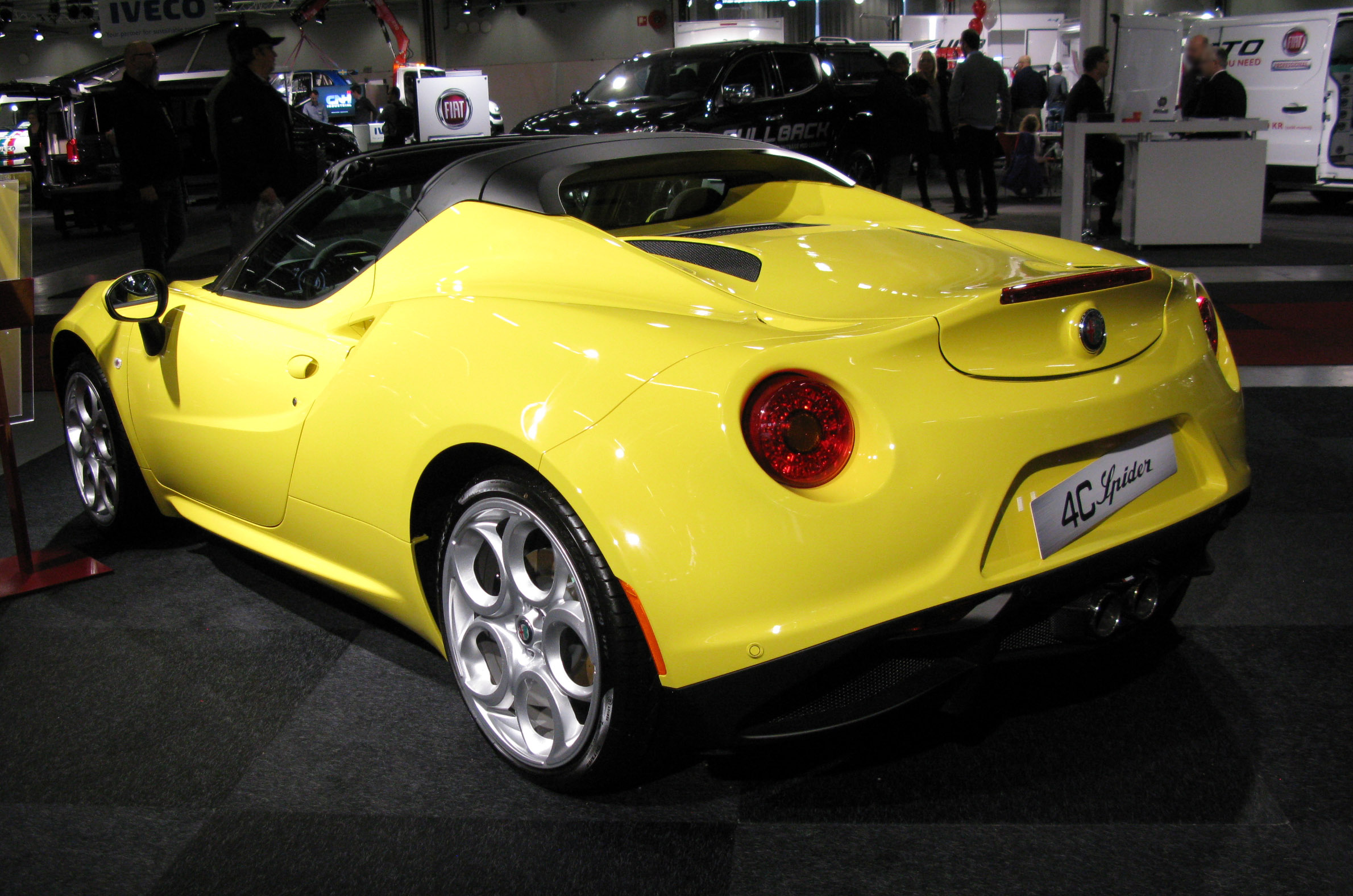 2017 Alfa Romeo 4C Spider